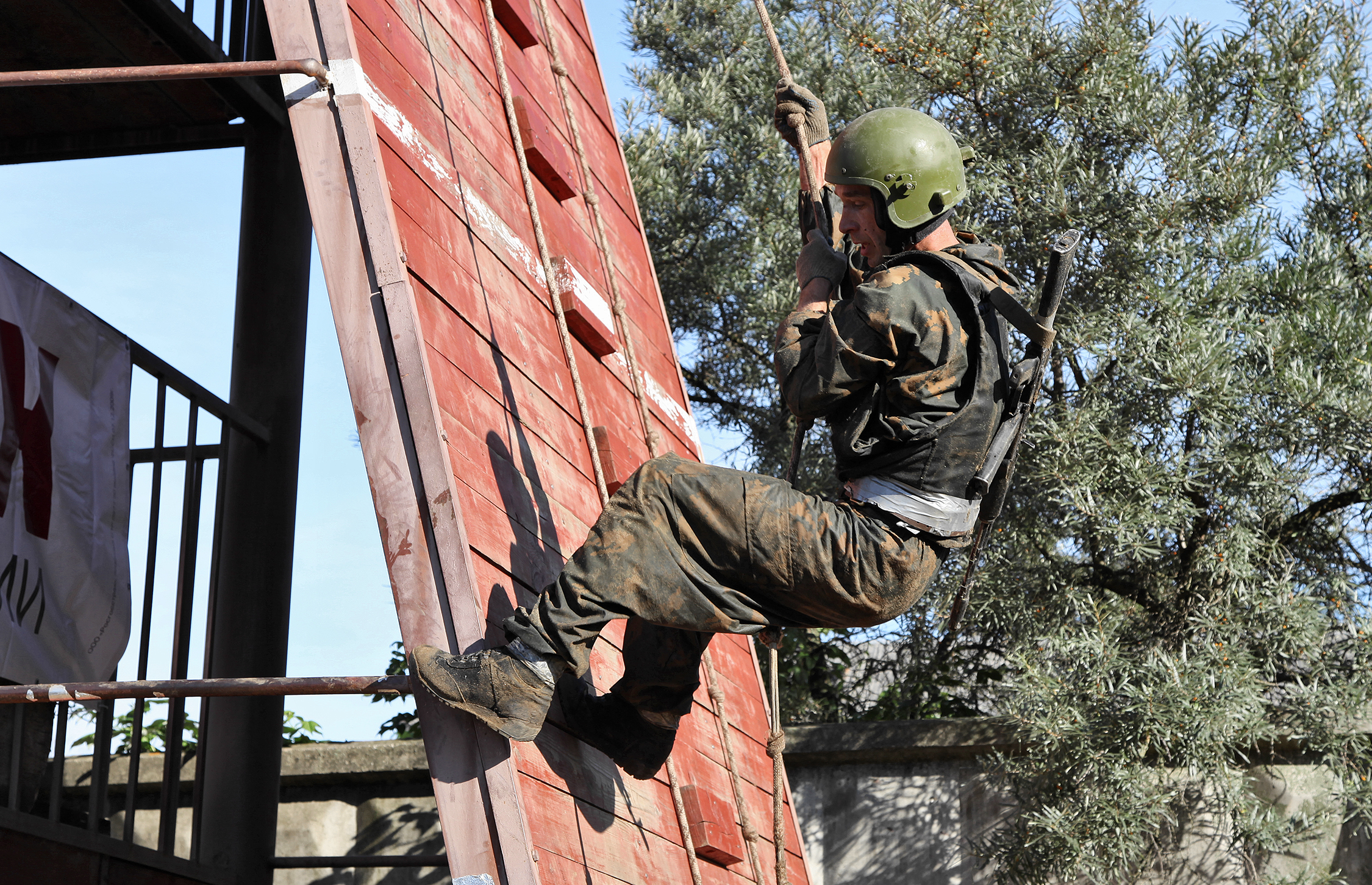 Преодоление штурмовой полосы в ходе испытаний на право ношение крапового берета